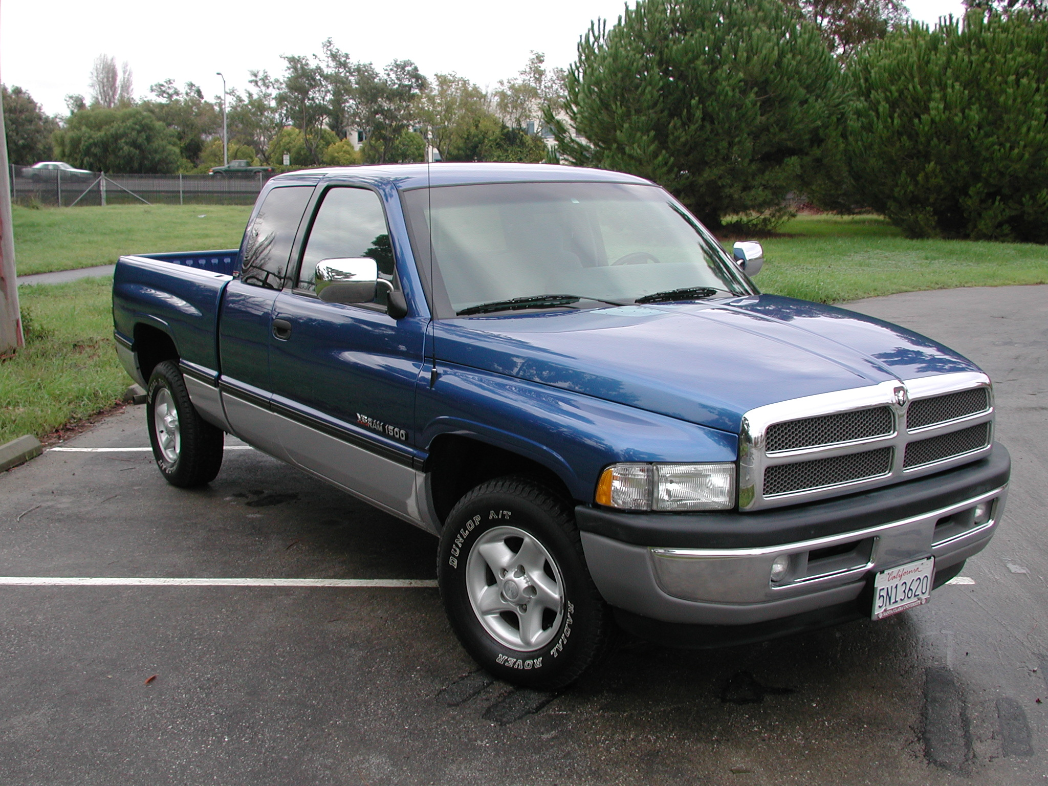 truck09